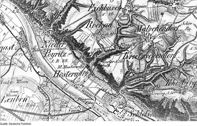 Original image description from the Deutsche Fotothek Dresden-Hosterwitz. Oberreit, Sect. Dresden, 1821/22